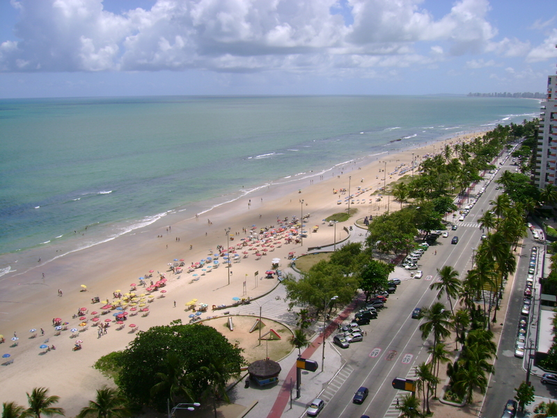 Recife, Boa Viagem beach